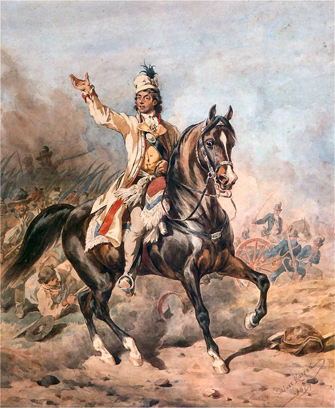 Equestrian portrait of Tadeusz Kościuszko